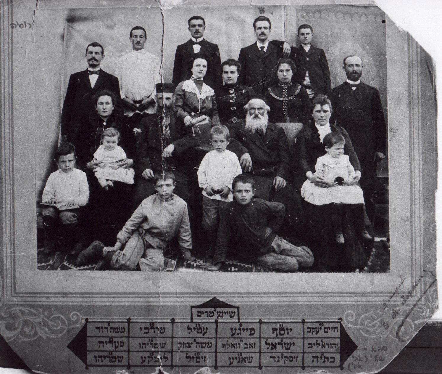 ייִדיש: רבי חיים יעקב רייסקין און זיין משפחה, אין טאטארסק (דאטום: בערך 1900).